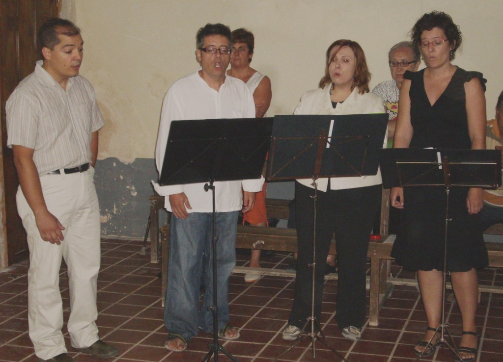 Abant Cuartet